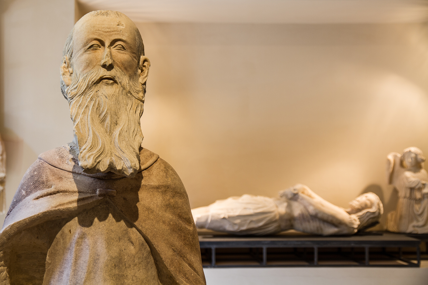 Antiquarium comunale This is a photo of a monument which is part of cultural heritage of Italy.